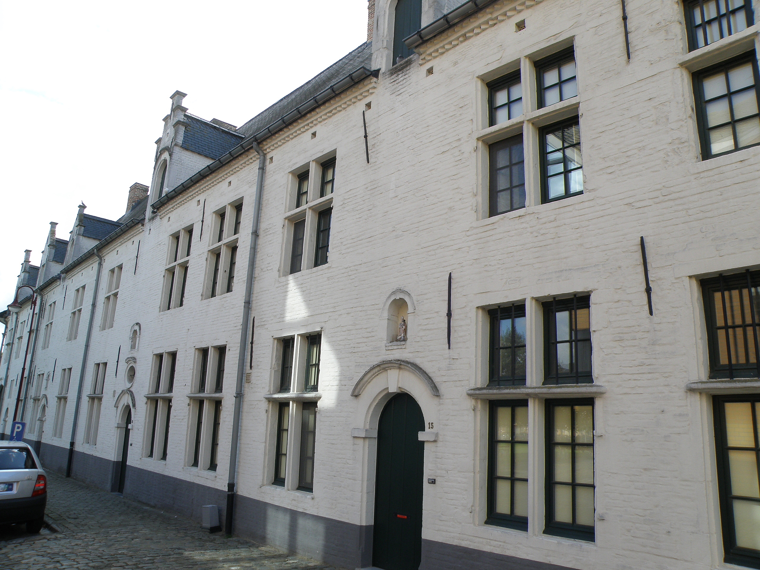 Aarschot, Belgique. Béguinage, maisonnettes de béguines sur la face ouest du béguinage.